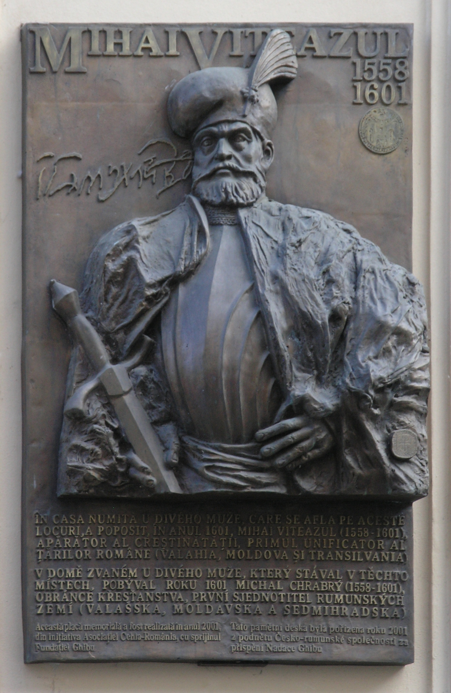 Praha, Malá Strana - pamětní deska Michala Chrabrého na fasádě Morzinského paláce (Nerudova 5)